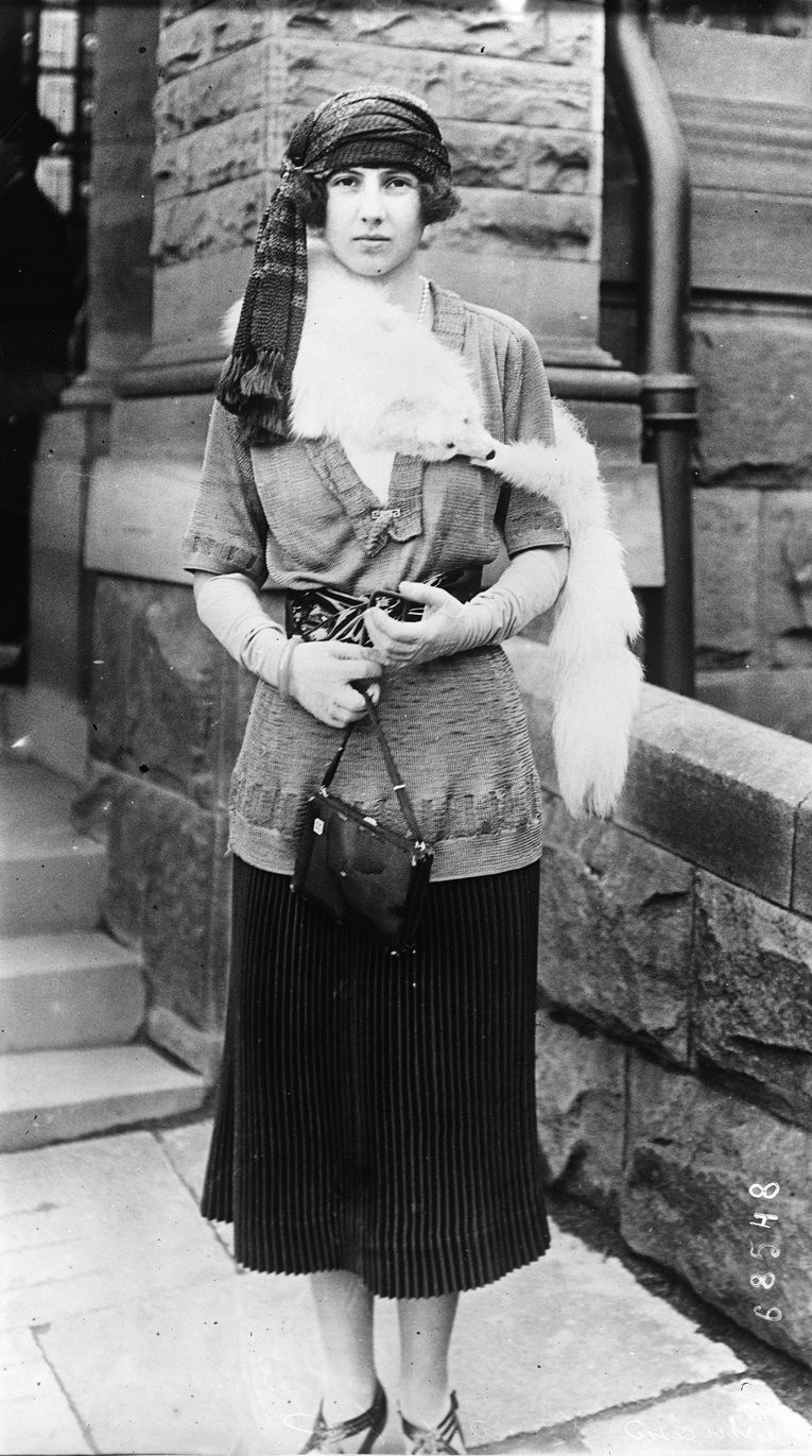 Princesse Xénia Georgievna de Russie.